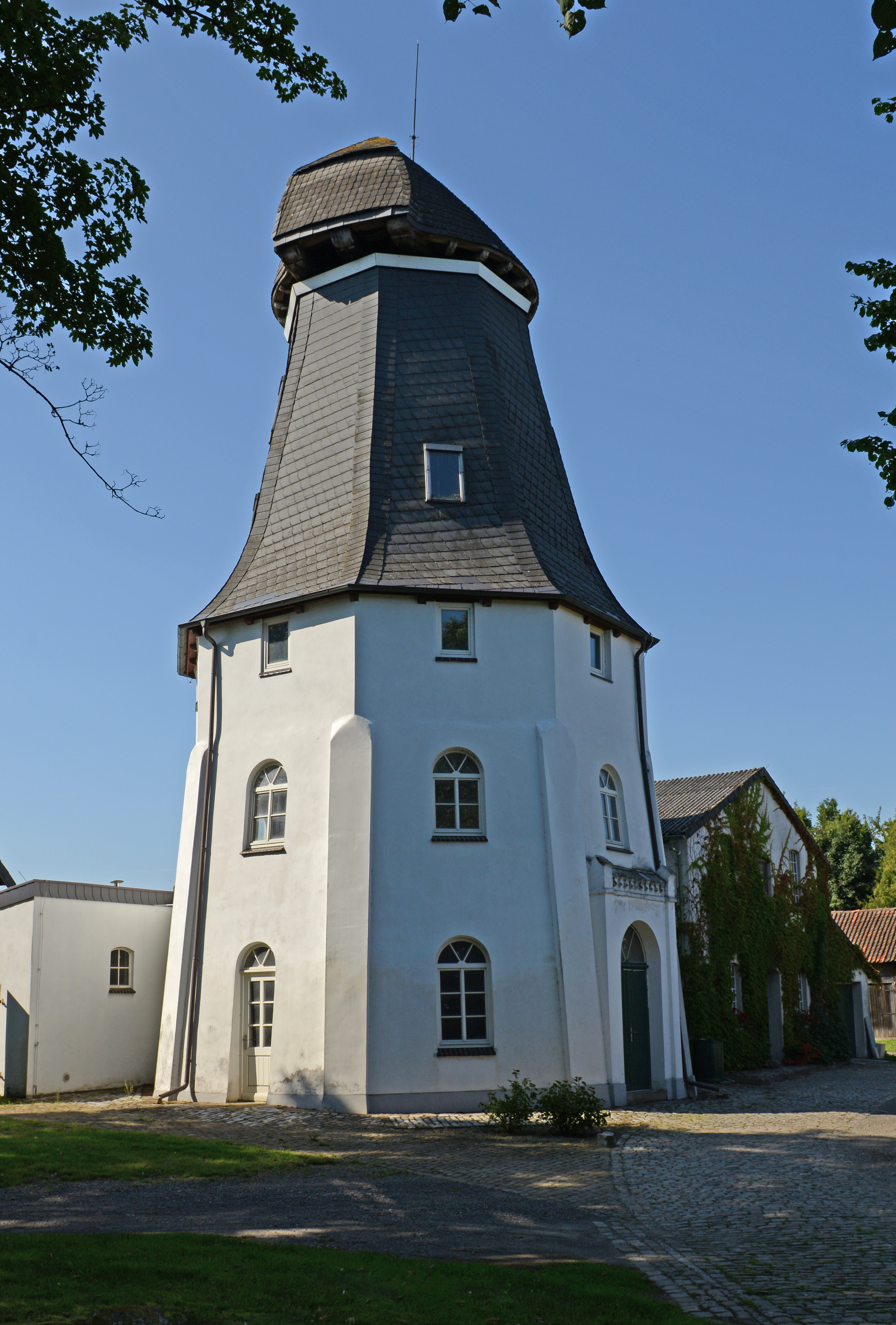 Baudenkmal in Syke Ristedt, Windmühle